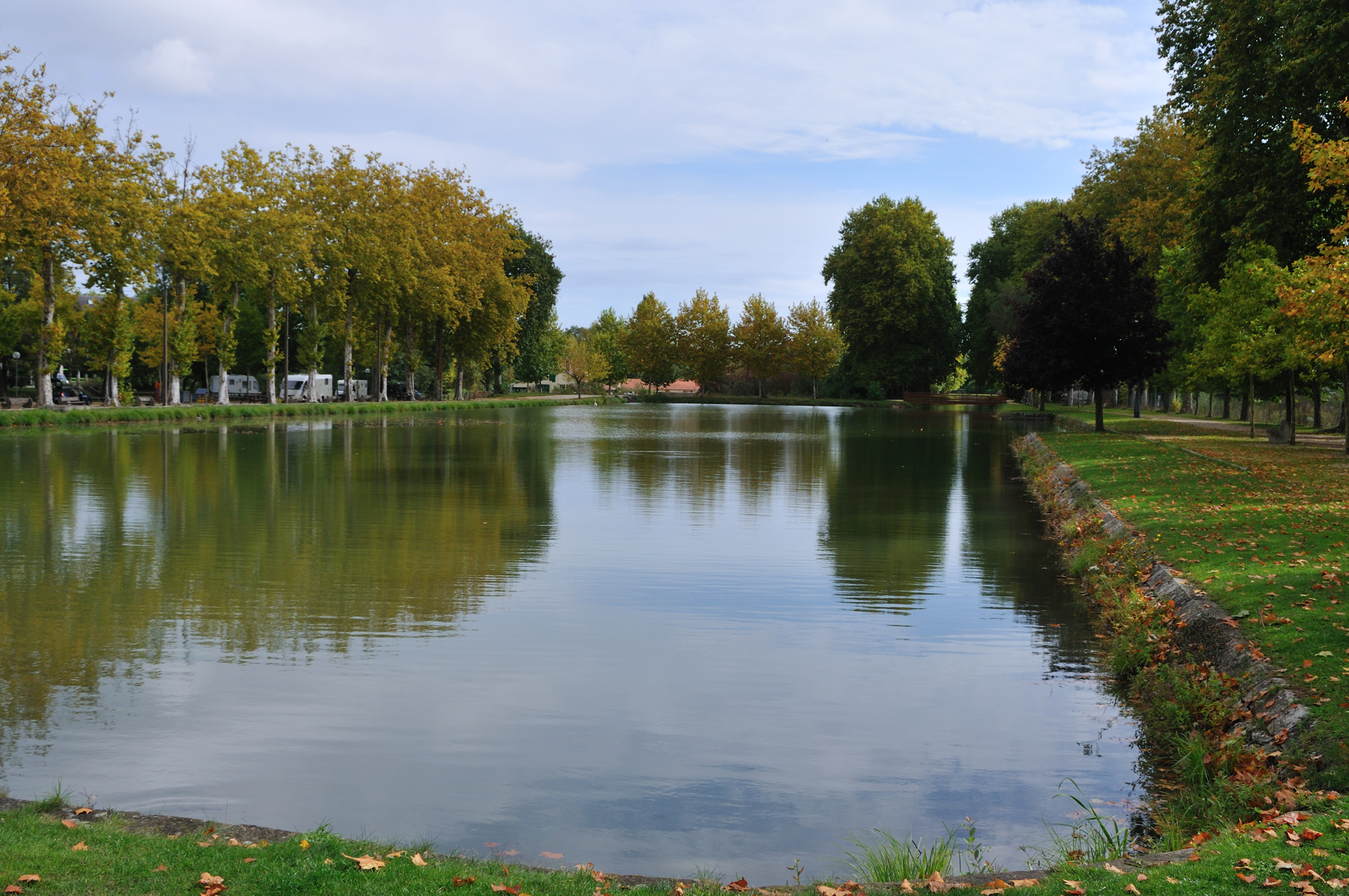 Bassin du canal de la Sauldre (point d'aboutissement du canal), Lamotte-Beuvron, Loir-et-Cher, France